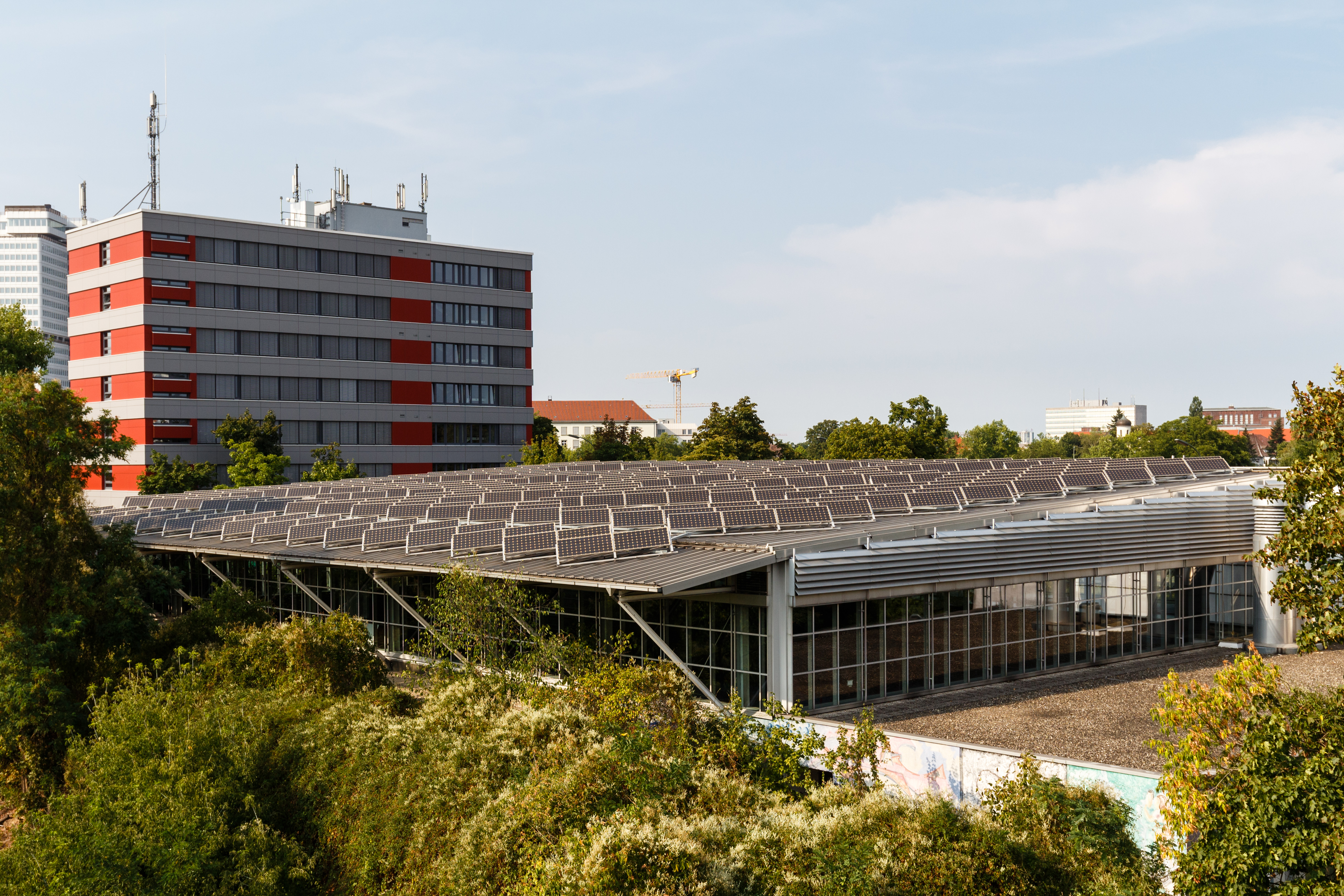 Gretel-Bergmann-Sporthalle in Berlin-Wilmersdorf vom Hogen Bogen aus gesehen